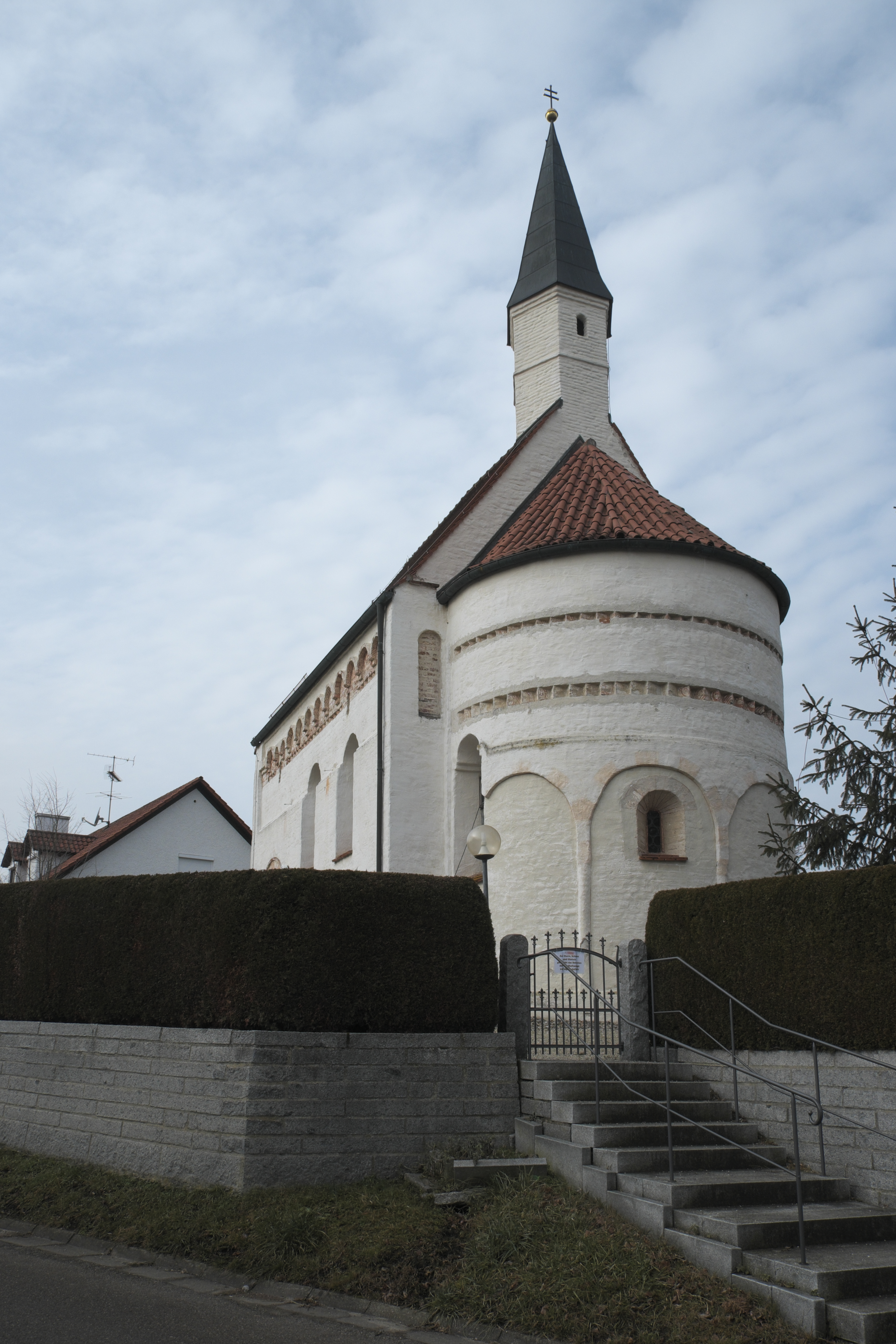 Katholische Filialkirche St. Valentin und St. Martin in Gundelshausen (Schweitenkirchen) im Landkreis Pfaffenhofen an der Ilm (Bayern/Deutschland), romanische Saalkirche, Stufenportal und Rechteckblende mit Bogenfries und Deutschem Band an der südlichen Langhauswand